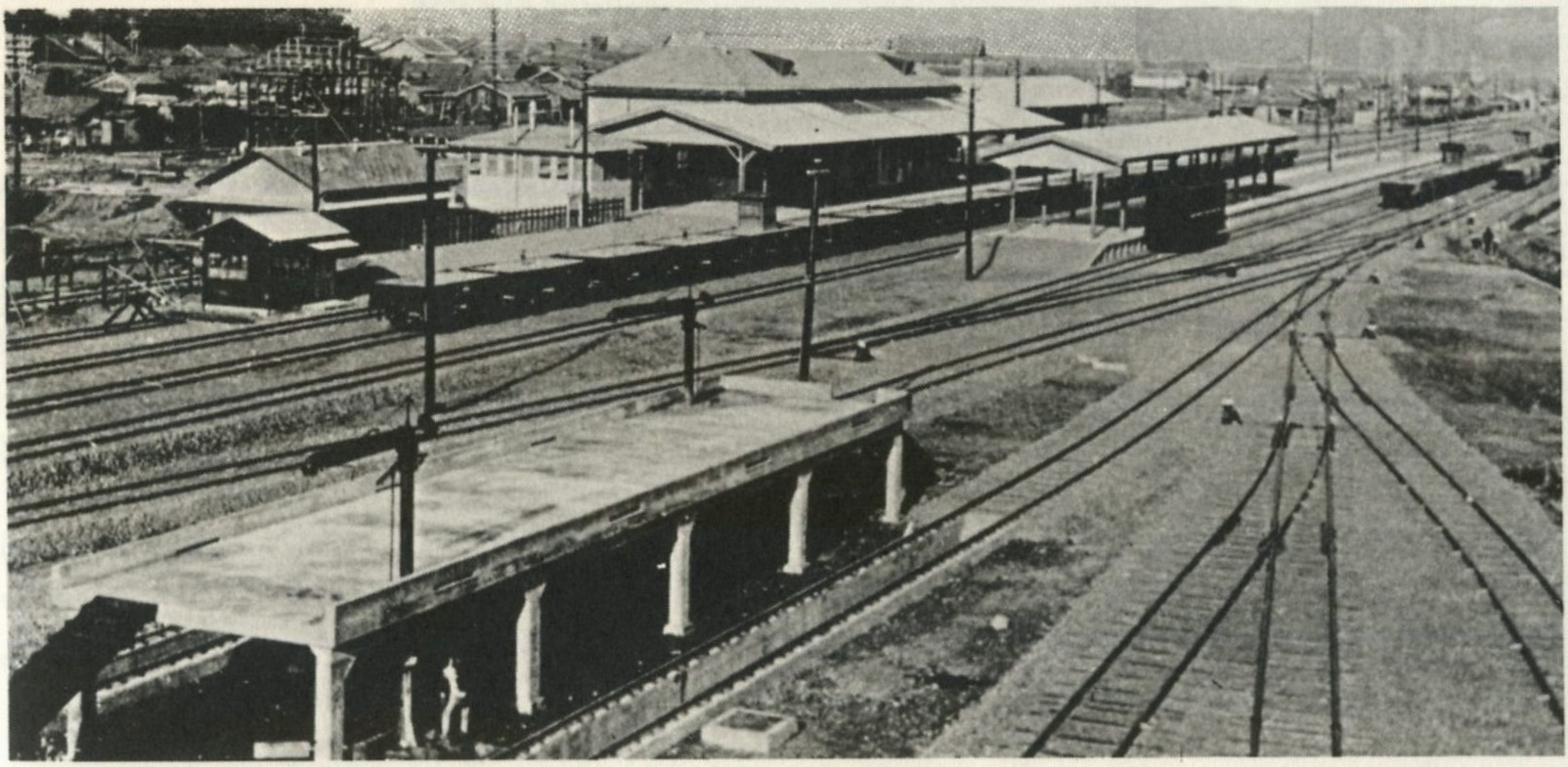 昭和9年の紀伊田辺駅構内。